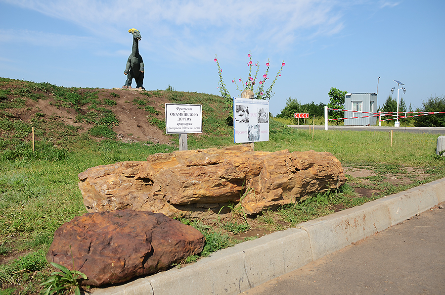 Клебан-Бицьке відслонення, Костянтинівський р-н, лівий берег Клебан-Бикського водосховища